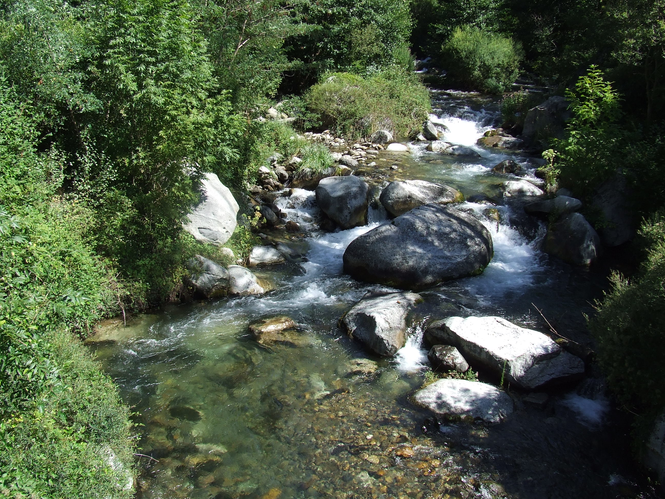 El Flamisell, a Molinos (la Torre de Cabdella, Pallars Jussà)